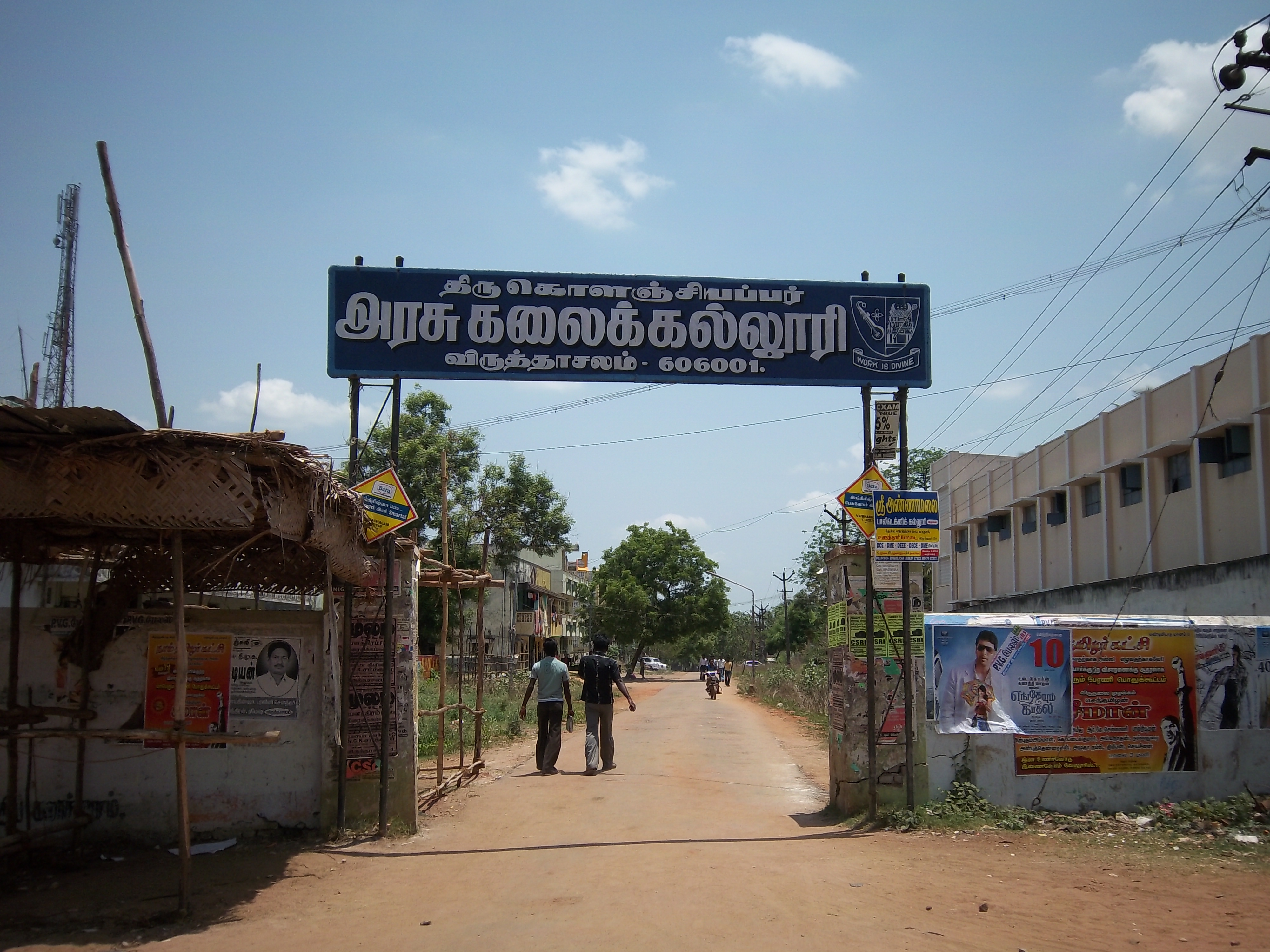 திரு கொளஞ்சியப்பர் அரசினர் கலைக்கல்லூரி நுழைவாயில்